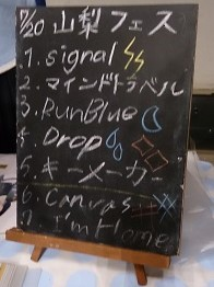 amiinaセトリボード(20150720(1))